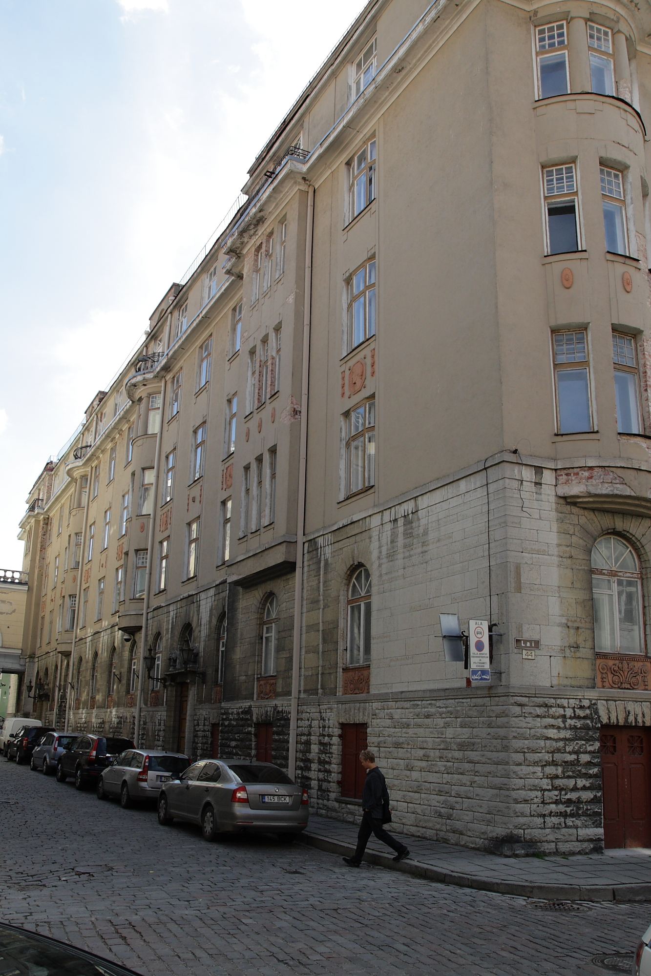 Tallinn, hoone, kus on paiknenud Eesti riigikaitseasutused ja võõrvõimude julgeolekuorganid